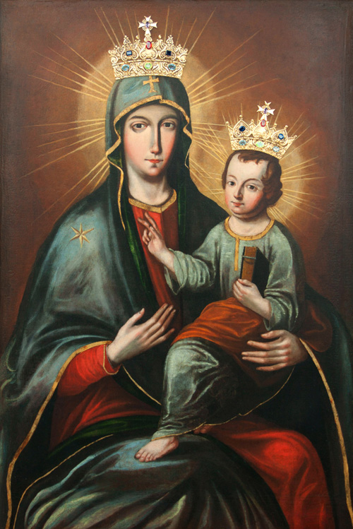 Obraz przedstawia wizerunek Matki bożej Pocieszenia, który znajduje siew ołtarzu głównym Sanktuarium Maryjnego w Golinie. Obraz przedstawia Madonnę z Dzieciątkiem Jezus na lewej ręce. Brązowe tło rozjaśnia się wokół głowy Matki i Syna, przechodzi w kolor złocistożółty. Głowy również okolone są złocistymi promieniami. Maryja ma twarz o rysach pociętych i surowych, oczy ciemne, brwi szerokie, usta małe. Spięty pod szyją szaroniebieski płaszcz oblamowany złotem, częściowo pokrywa suknię, która jest koloru czerwonego ze złotym obrzeżem. Prawa ręka Matki Boskiej spoczywa na piersi, lewa podtrzymuje dzieciątko ubrane w szarobiałą suknię. Jezus prawą dłoń unosi w geście błogosławieństwa, w lewej trzyma książkę. Na głowie Matki Bożej i Jezusa znajdują się korony wykonane w srebrze i pozłacane.